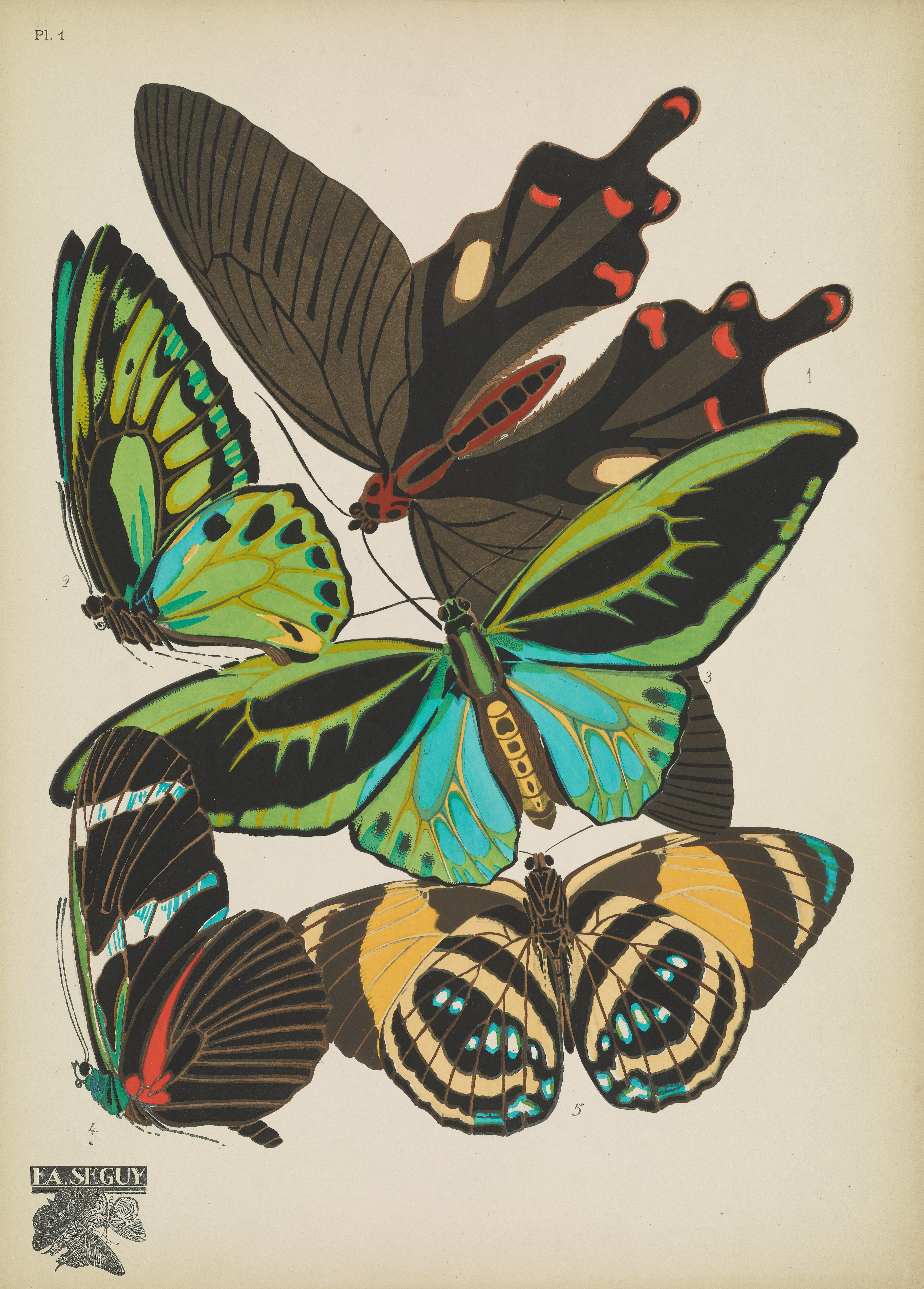 Papillons